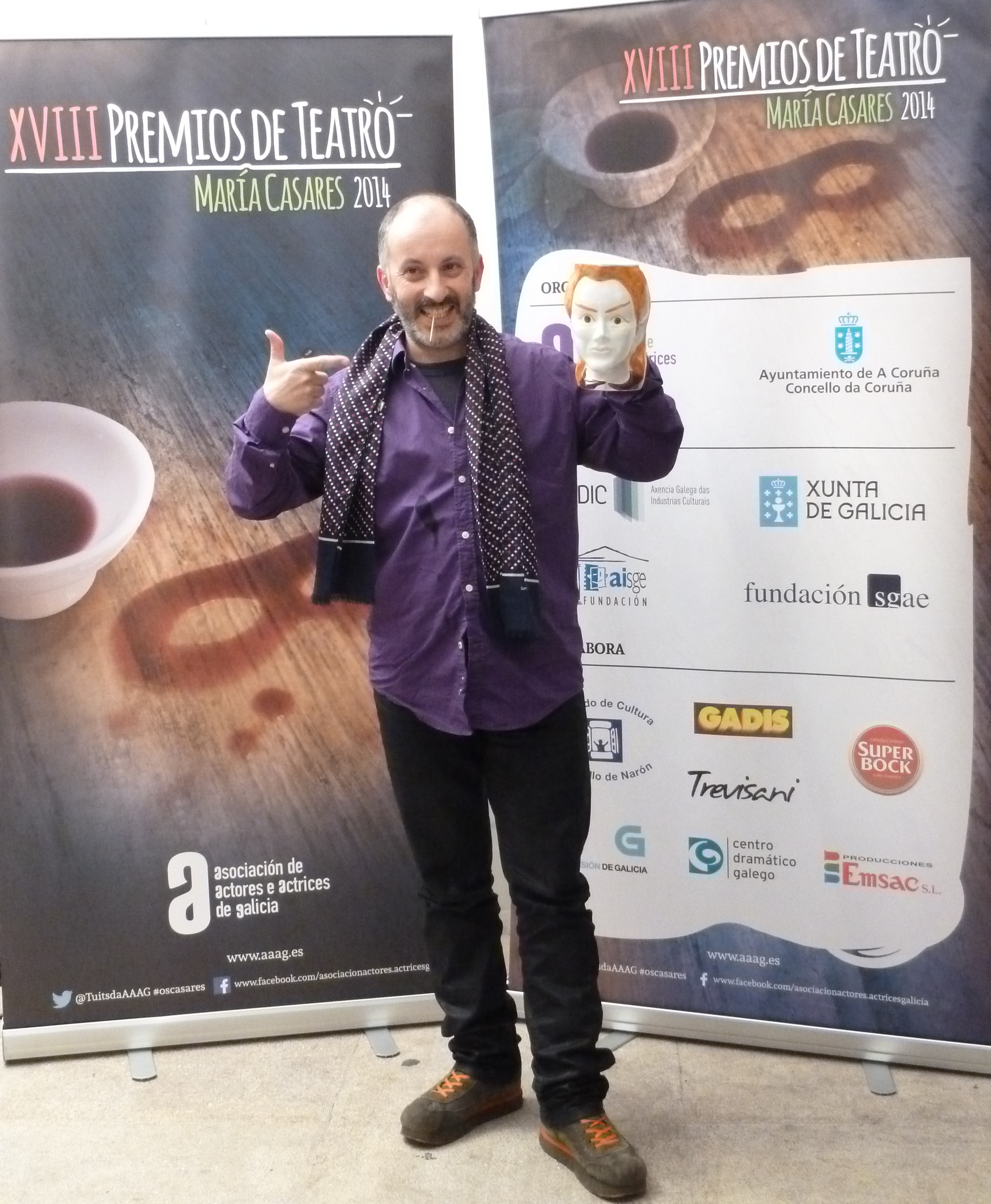 Josito Porto na gala dos premios María Casares 2014.